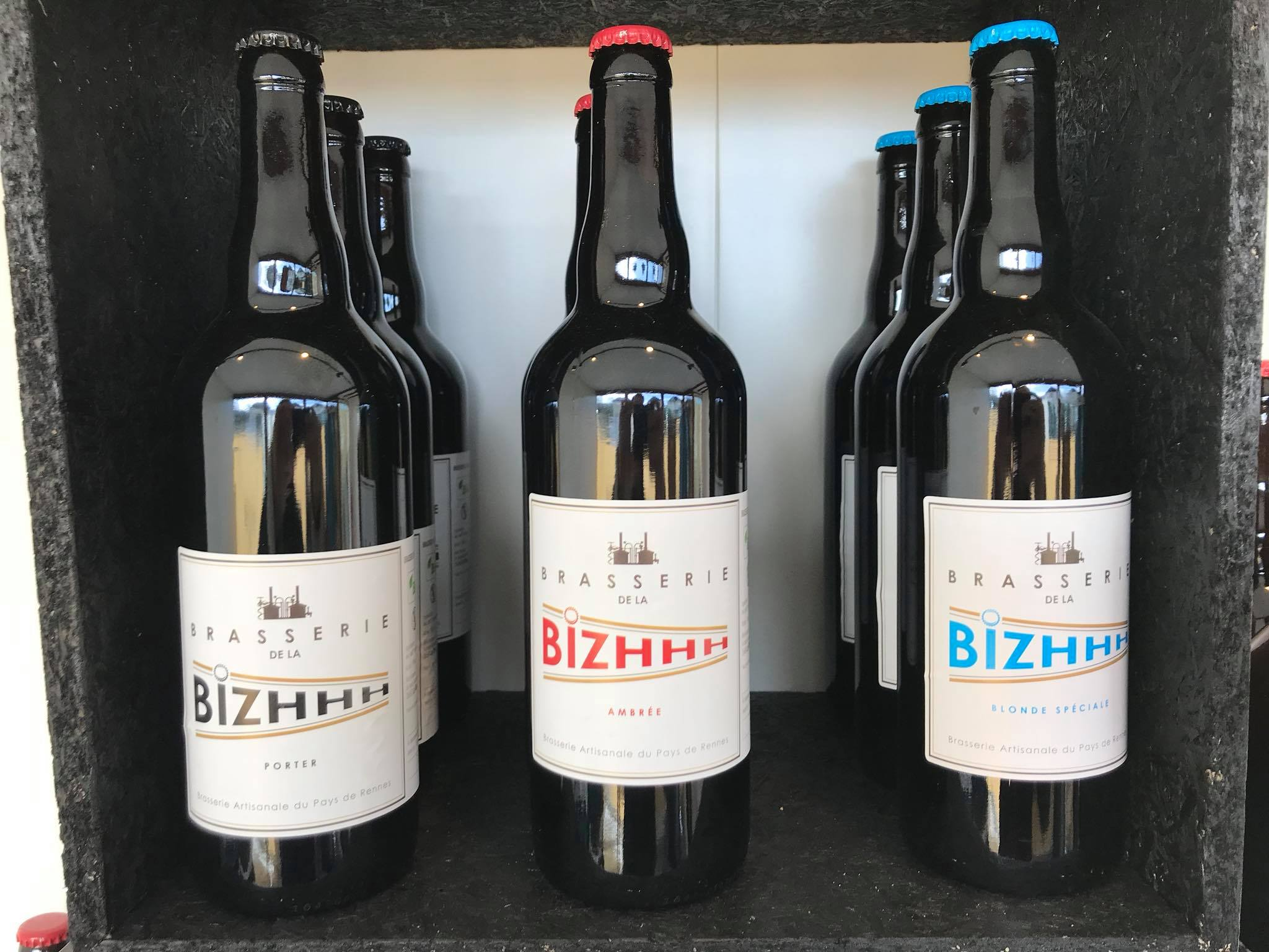 microbrasserie, bière, rennes, le rheu